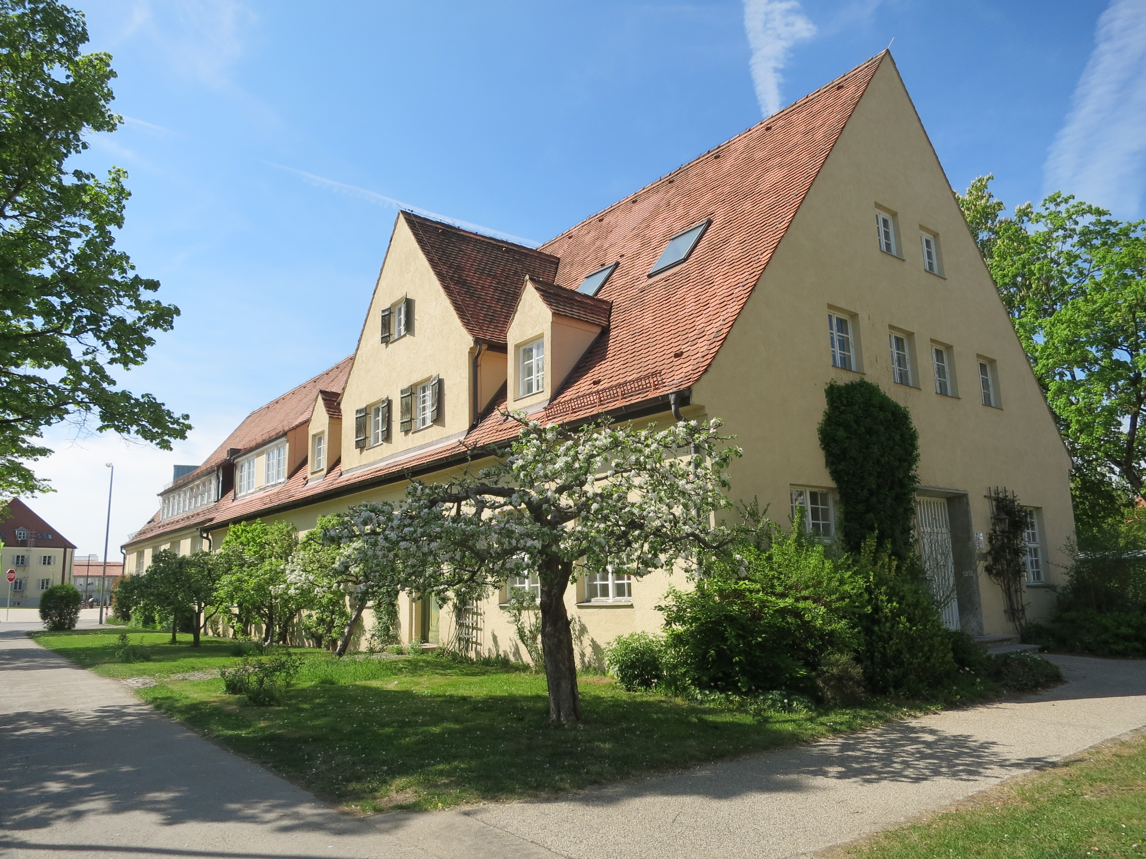 Landtechnik Vöttinger Straße 02